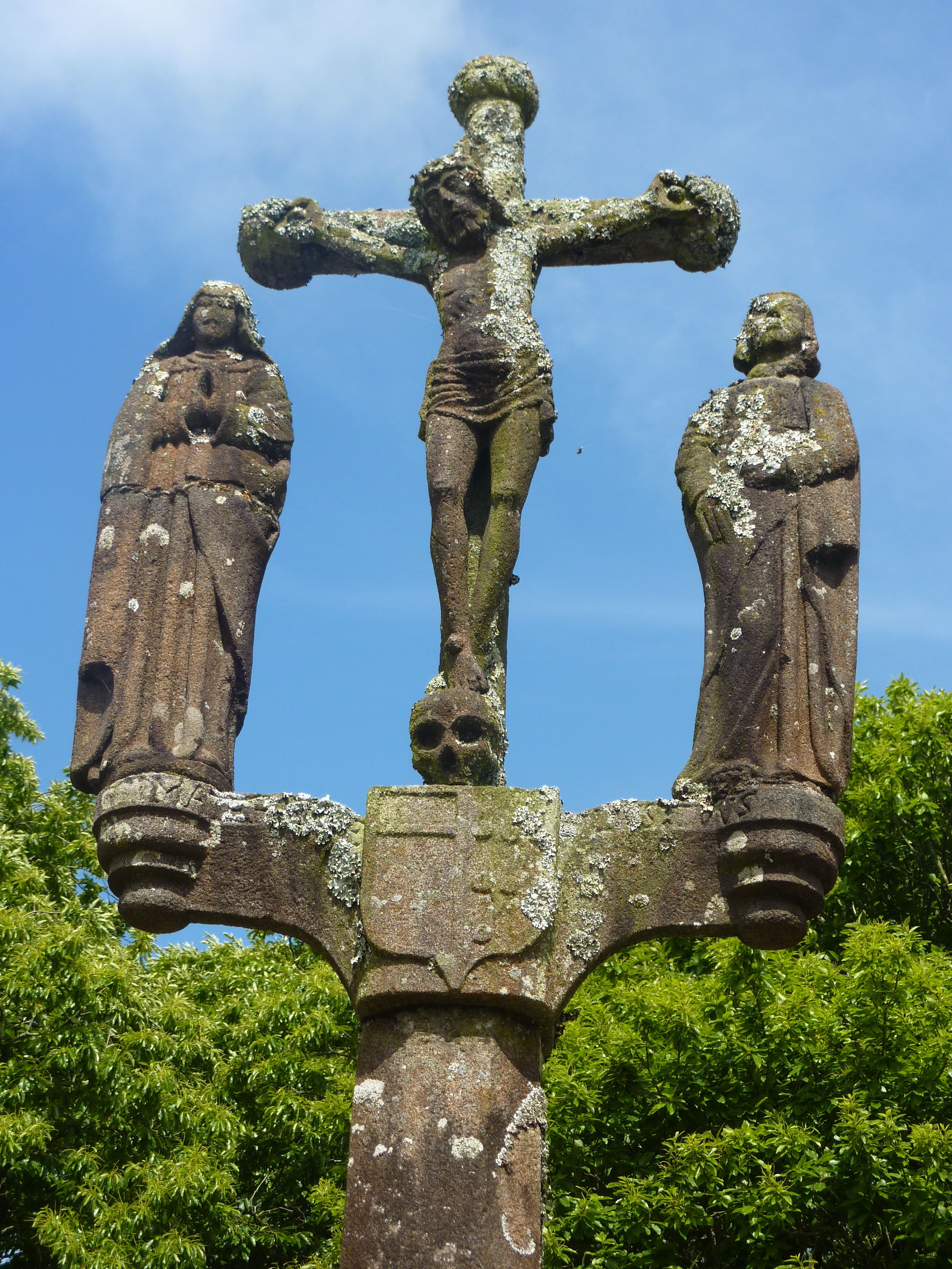 Saint-Divy (Finistère) : l'un des calvaires à l'entrée de l'enclos paroissial